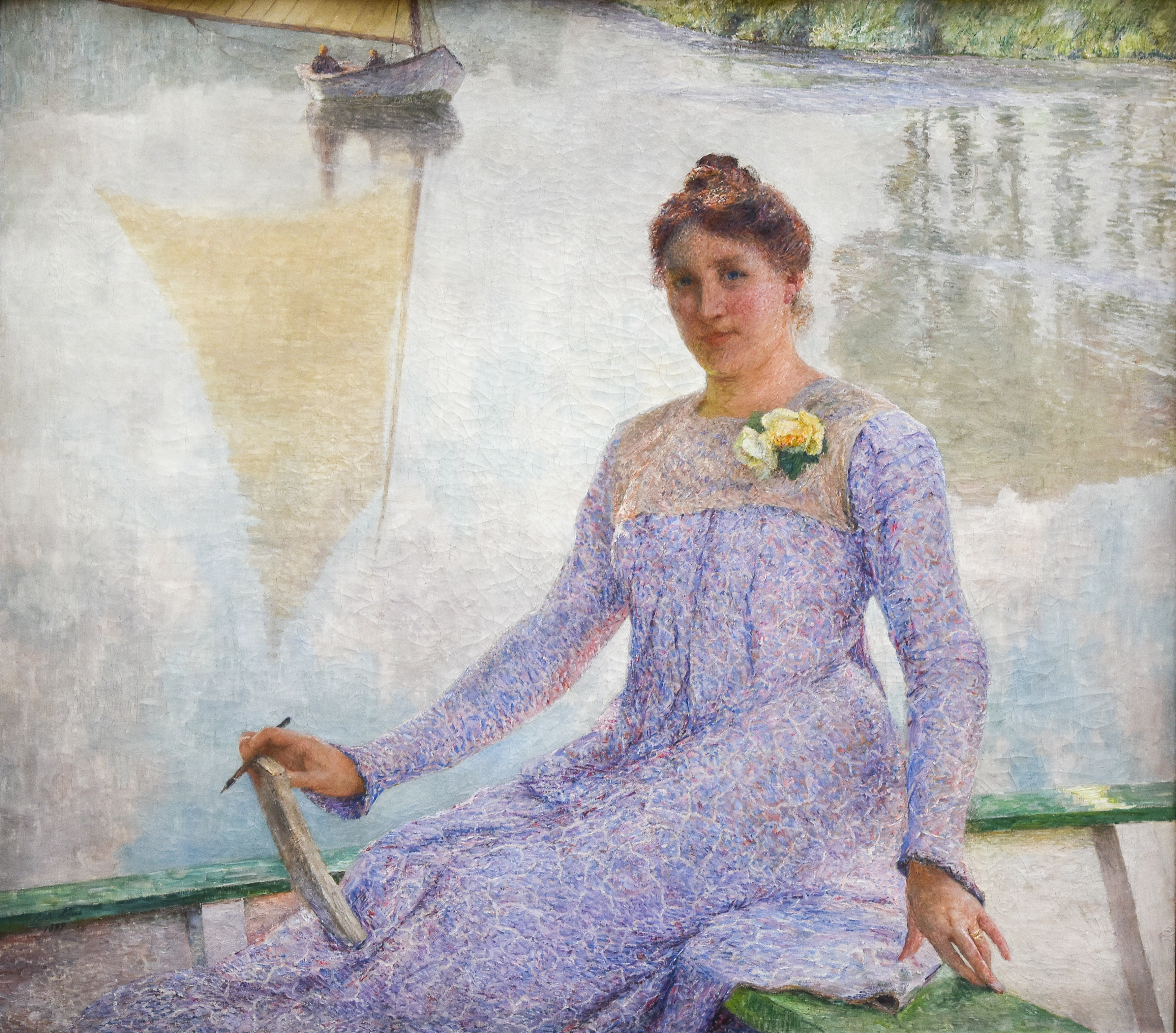 Emile Claus (1849-1924) Portret van de kunstenares Anna De Weert (1899) MSK Gent